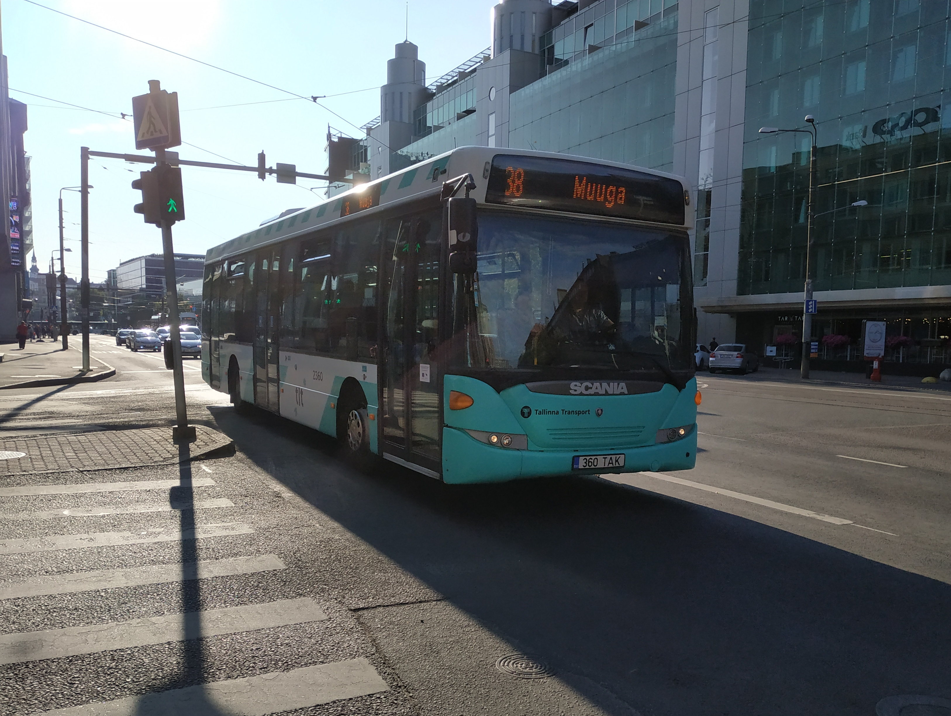 Scania Omnicity circulant à Tallinn